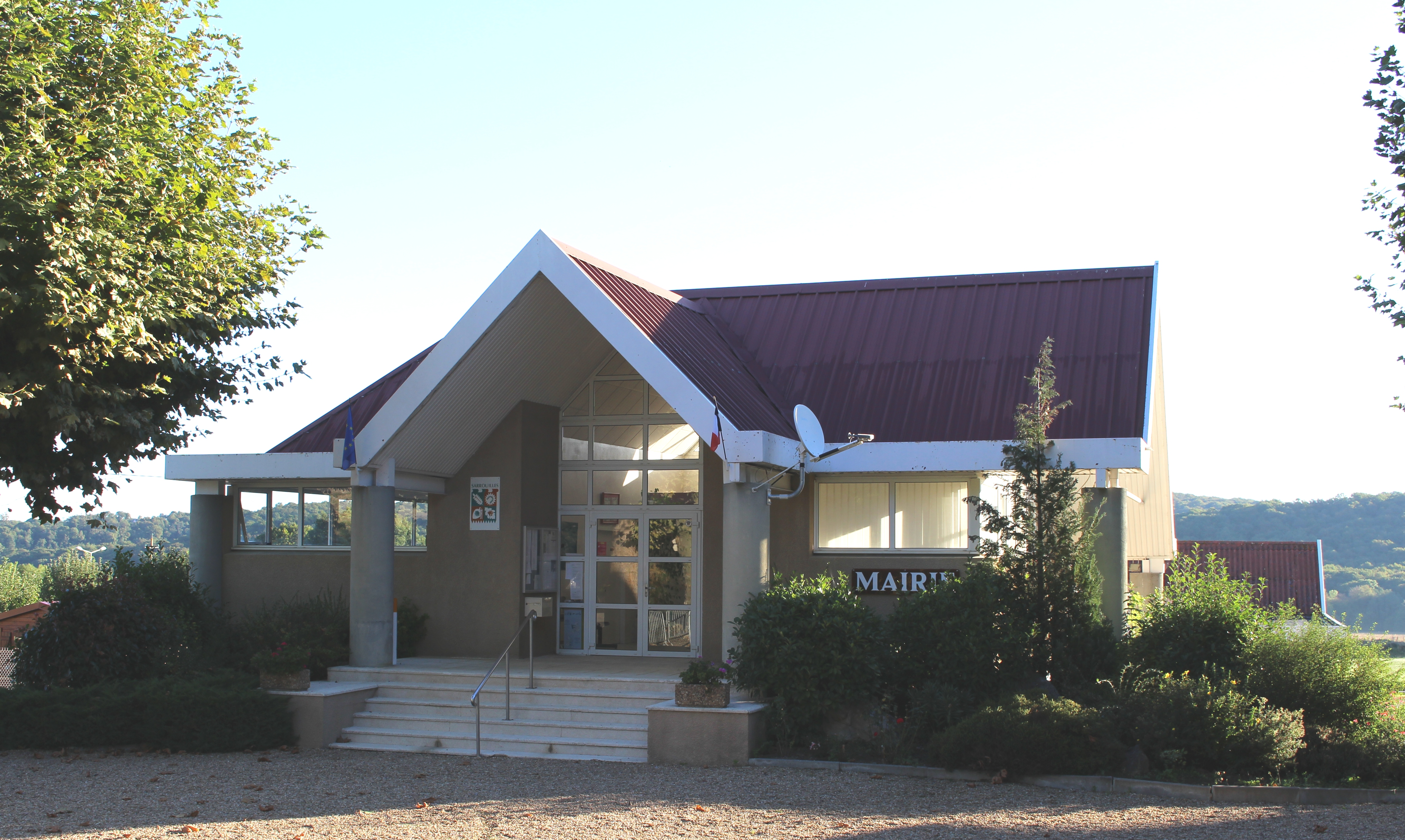 Mairie de Sarrouilles (Hautes-Pyrénées)